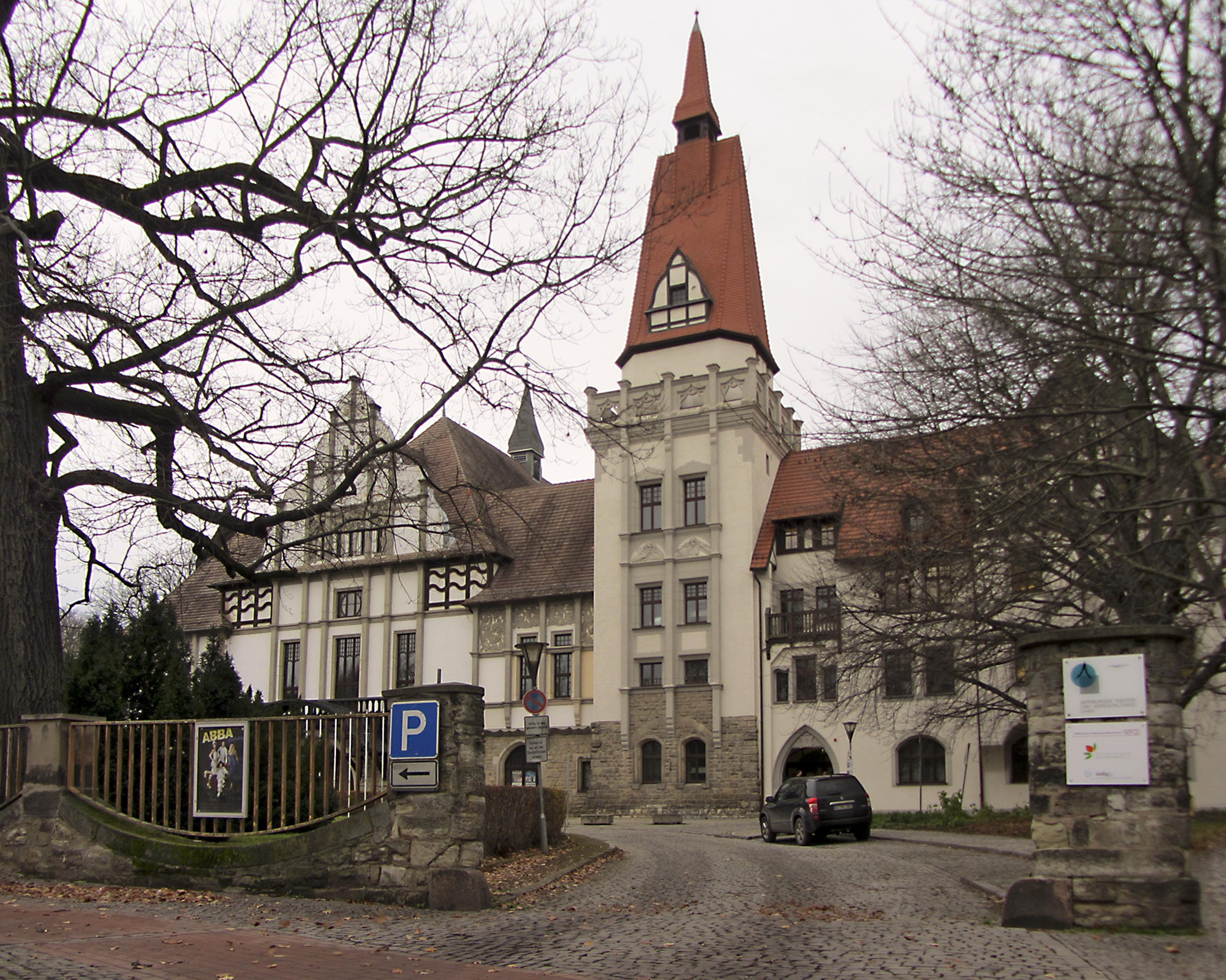 Kurhaus in Bernburg, Erbaut 1902